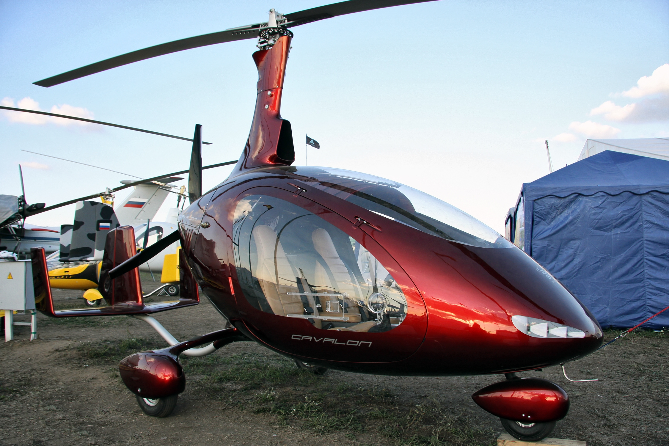 AutoGyro Cavalon